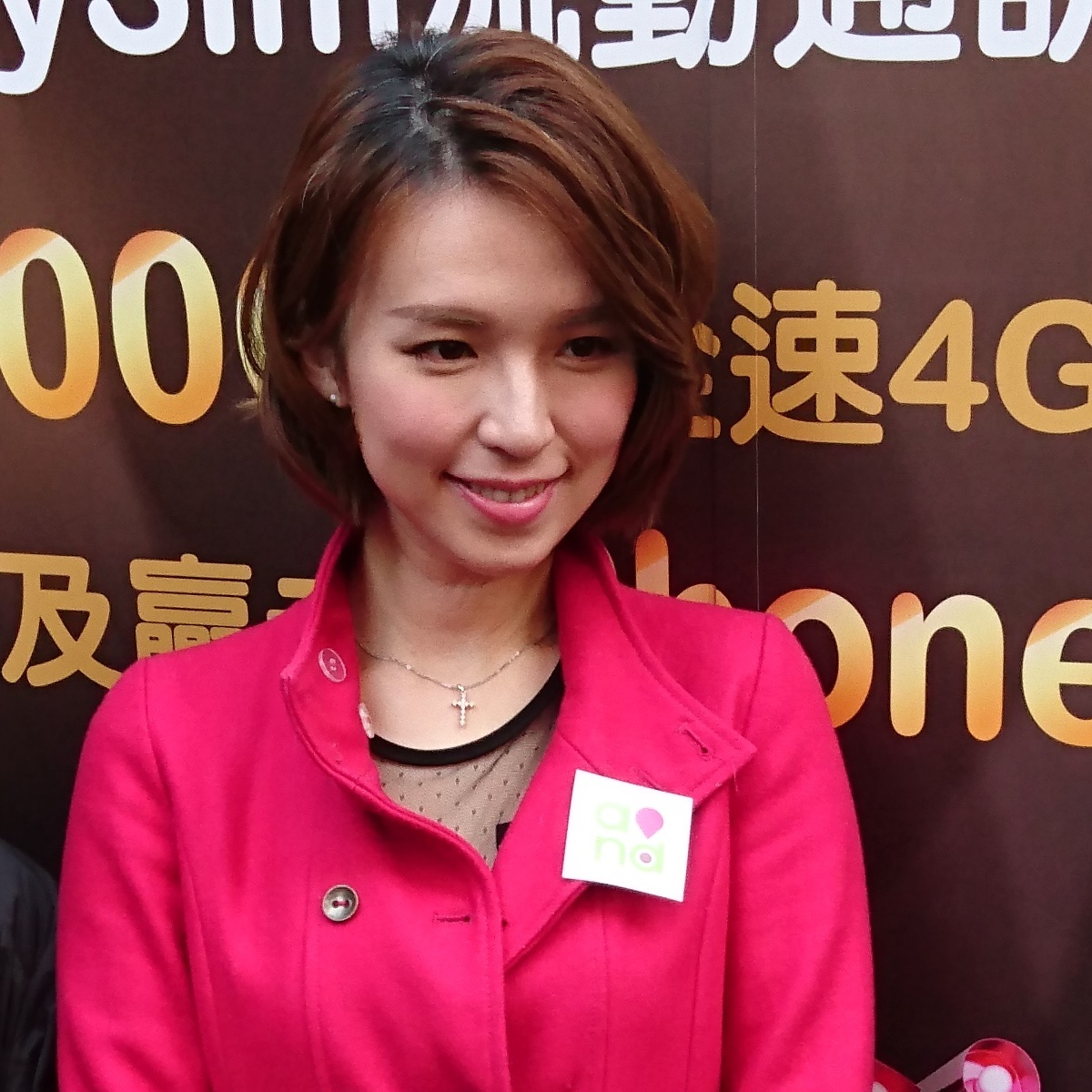 中文（香港）: 中國移動香港「MySim Sim卡」 銅鑼灣免費派發活動